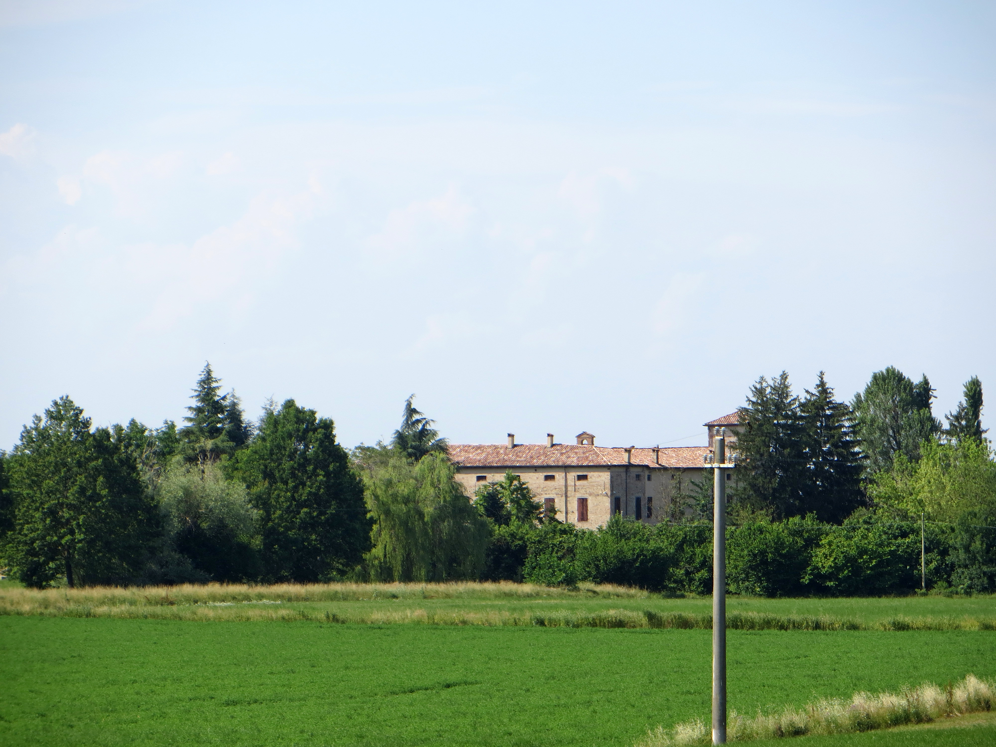 Abbazia di Santa Felicola (Montechiarugolo) - vista da sud-est del complesso